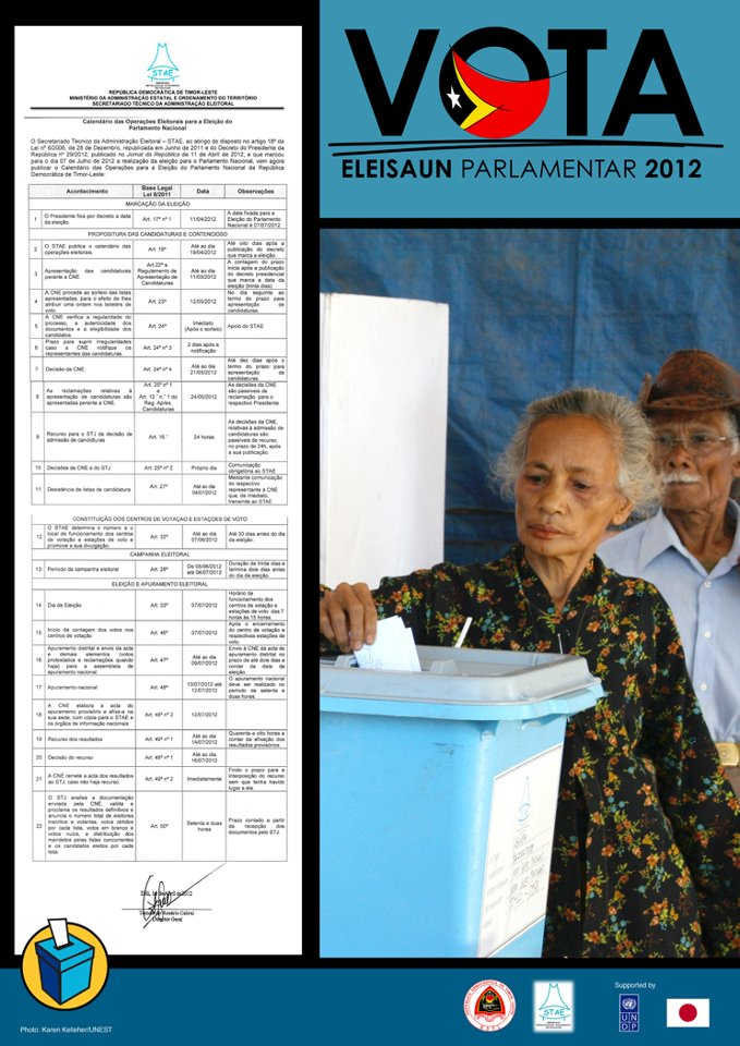 Wählerinformation zu den Parlamentwahlen in Osttimor 2012